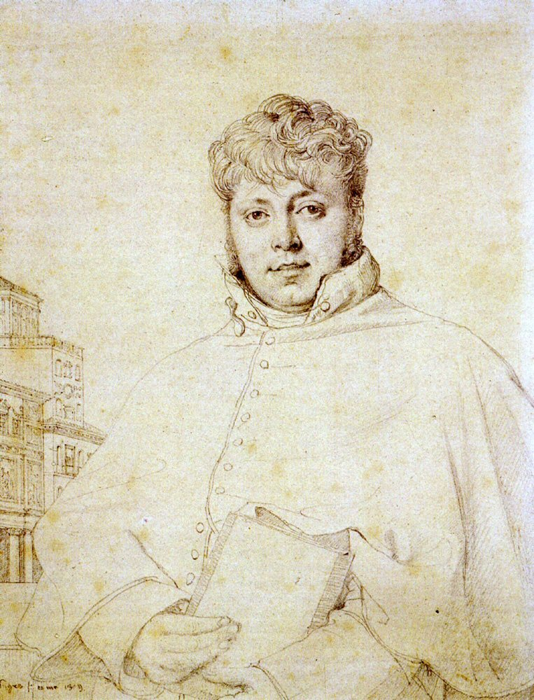 French Architect Auguste Guenepin